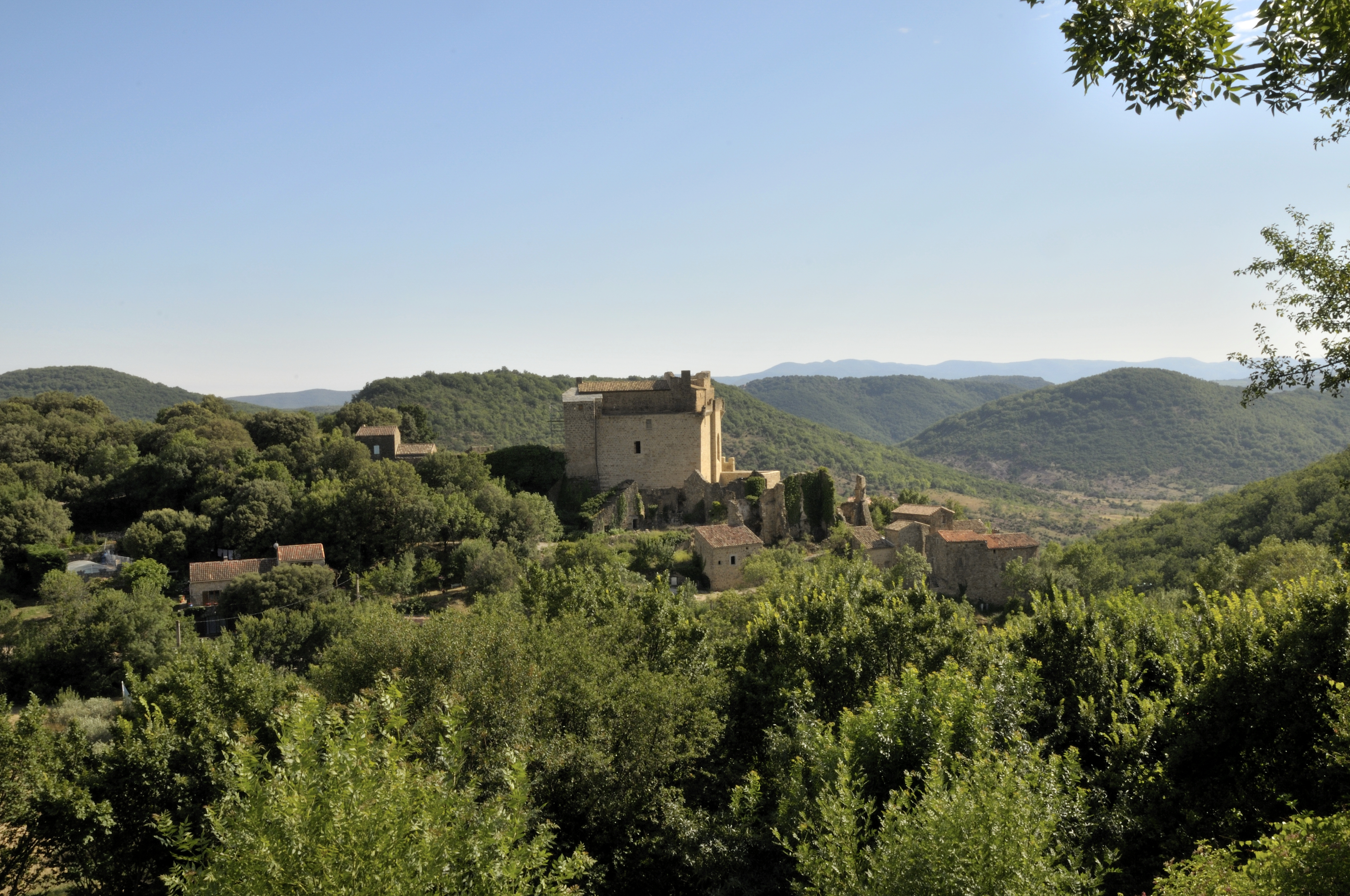 le château